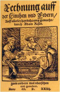 "Rechnung auff der Linihen und Federn..." Der Rechenmeister Adam Ries hatte keine eigene Schule. Dennoch hat er sein 2. Rechenbuch (Erstausgabe 1525) didaktisch sehr geschickt aufgebaut: Es beginnt mit dem anschaulichen Linienrechnen und führt erst danach zum anspruchsvolleren Ziffernrechnen ("Federn"). Erfurt, 1532 (Reprint)